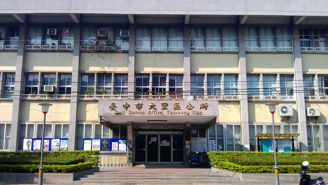 中文（台灣）: 大里區公所